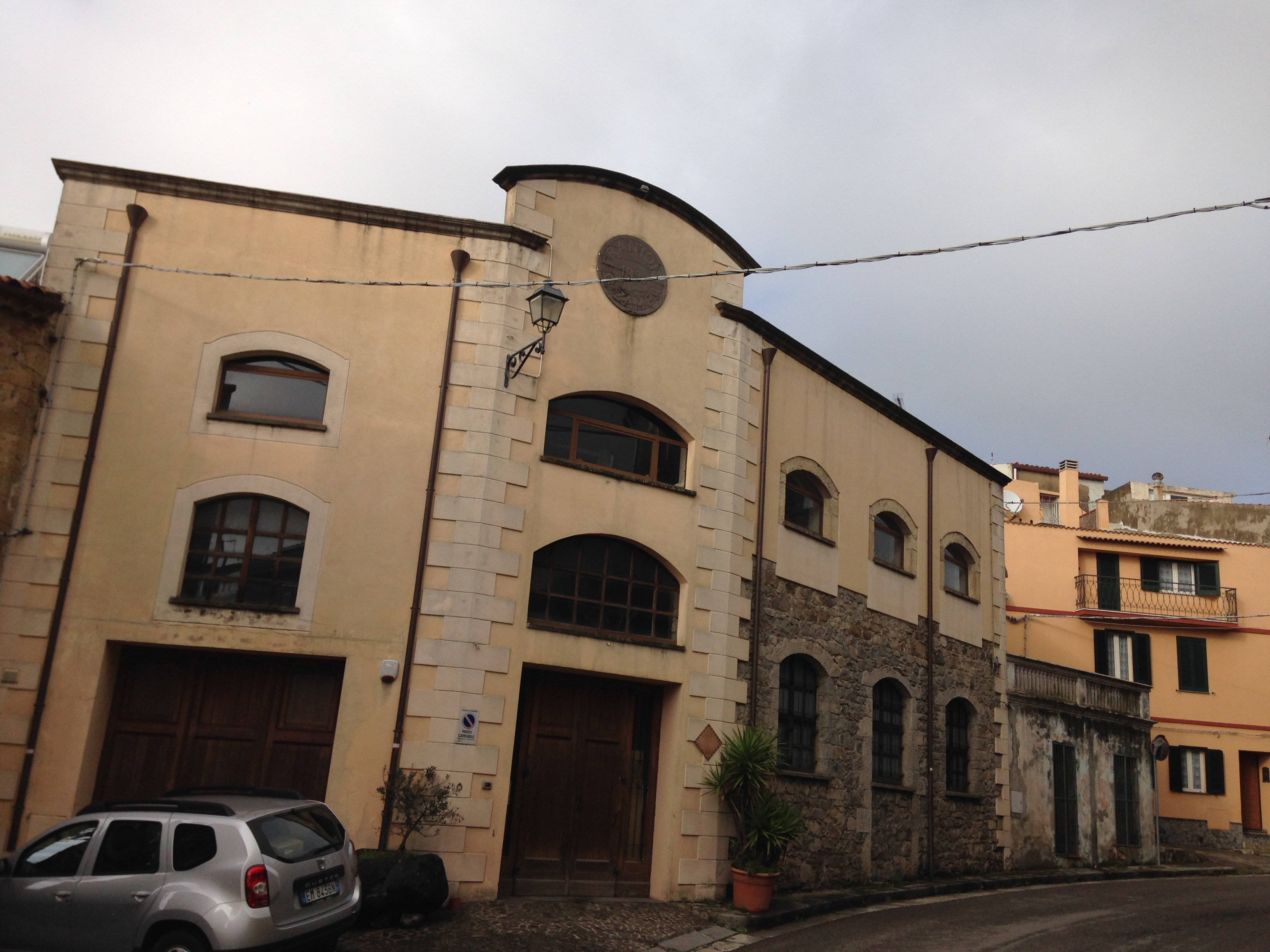 Museo dell'olio ed ex frantoio della famiglia Zampa